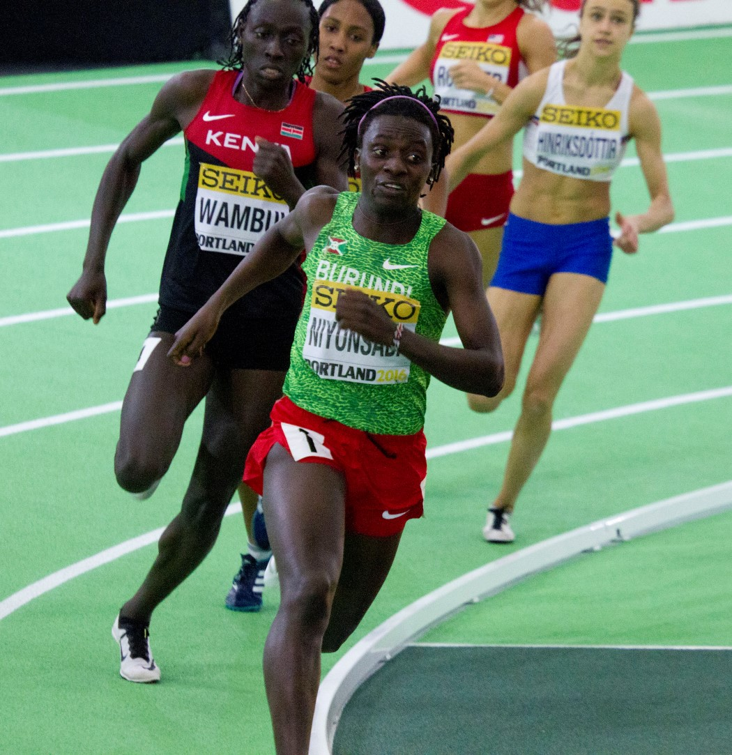 5067 800m dames